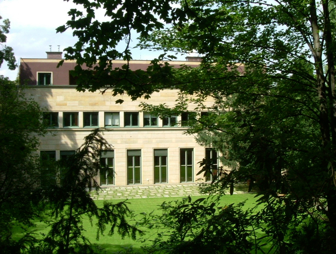 Gartenansicht der Villa Traub, August 2008